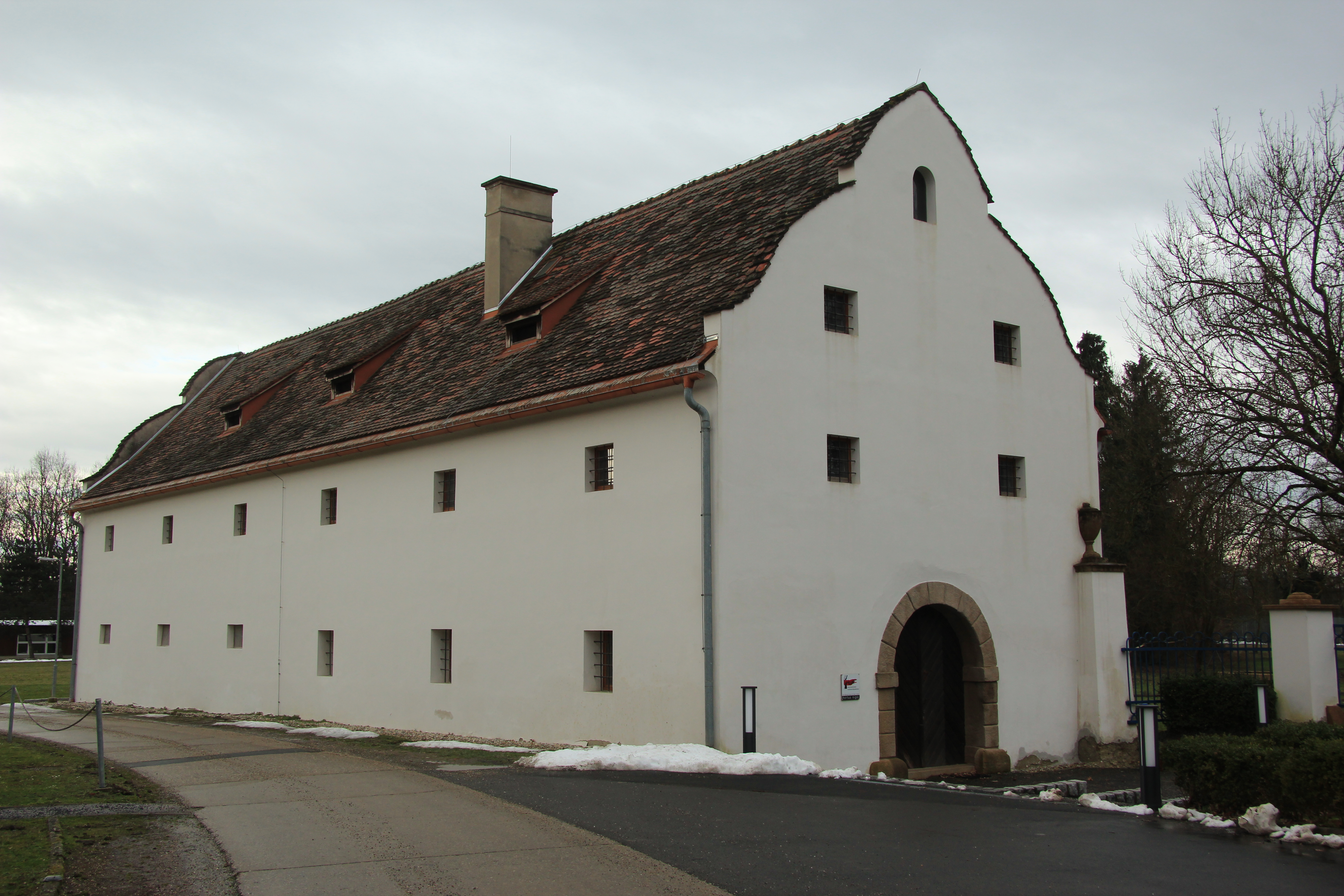 SchüttkastenHalbenrain, Steiermark